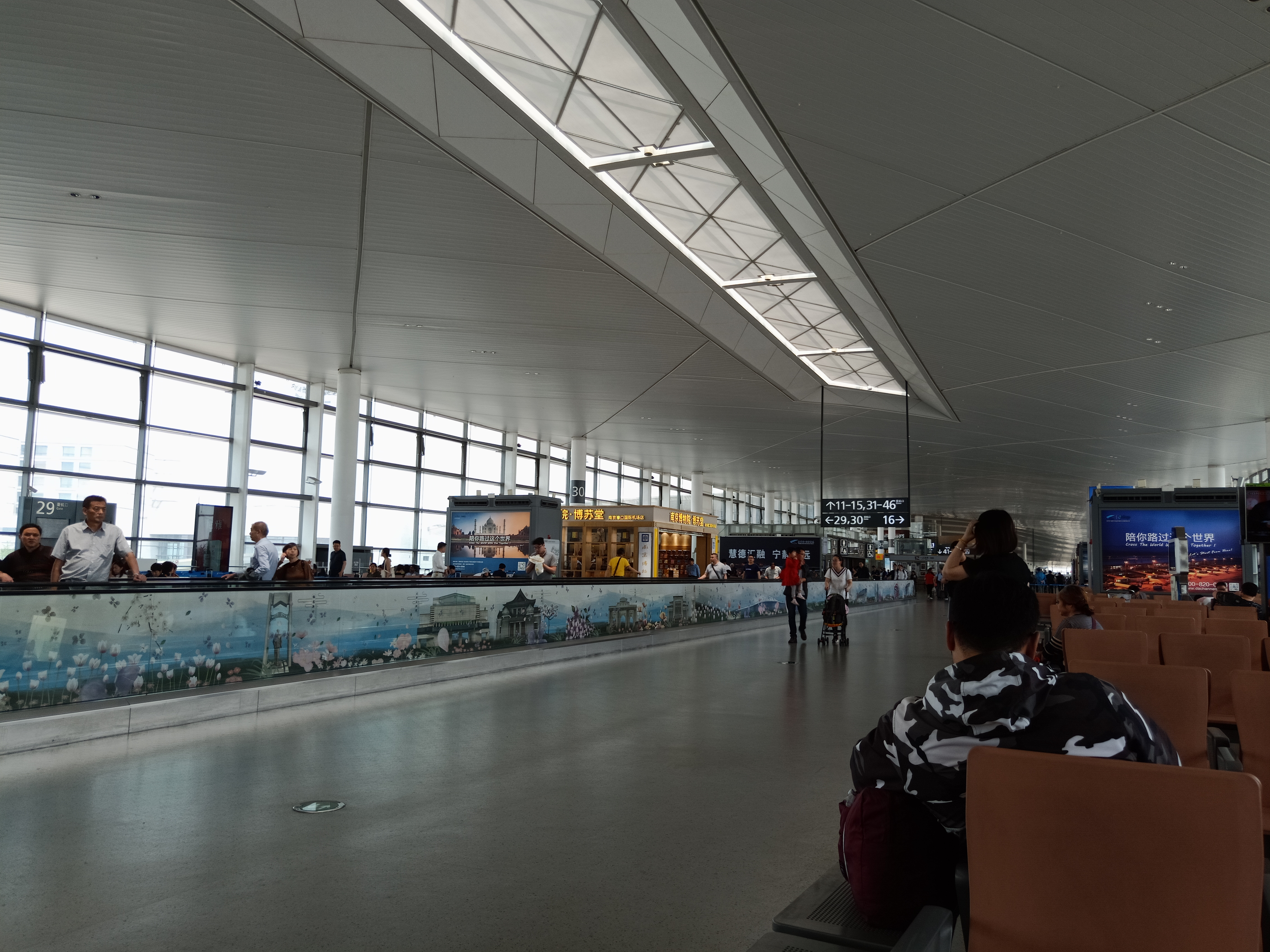 粵語: 南京祿口國際機場內部